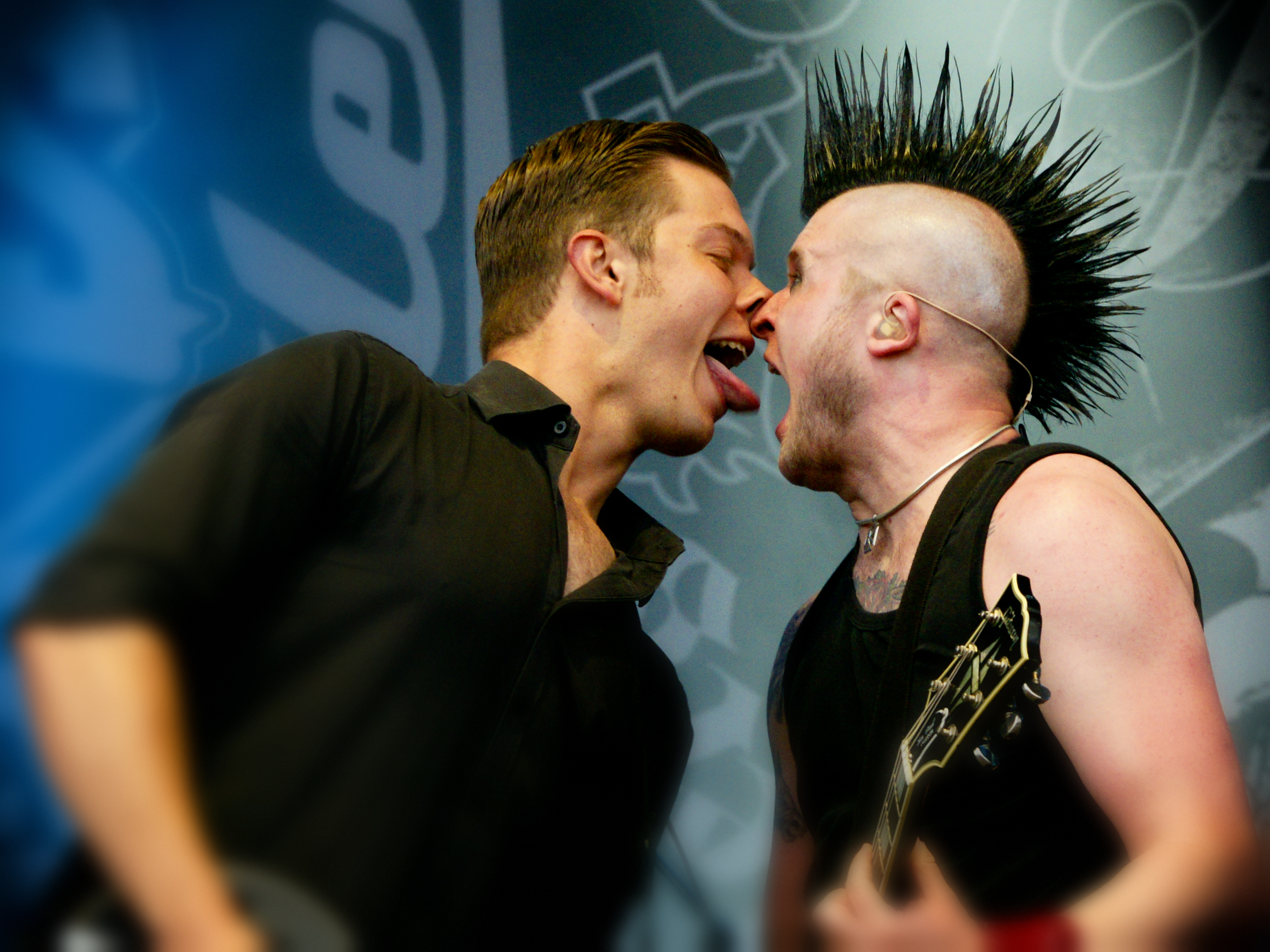 Deichbrand Seeflughafen Nordholz / Cuxhaven Broilers